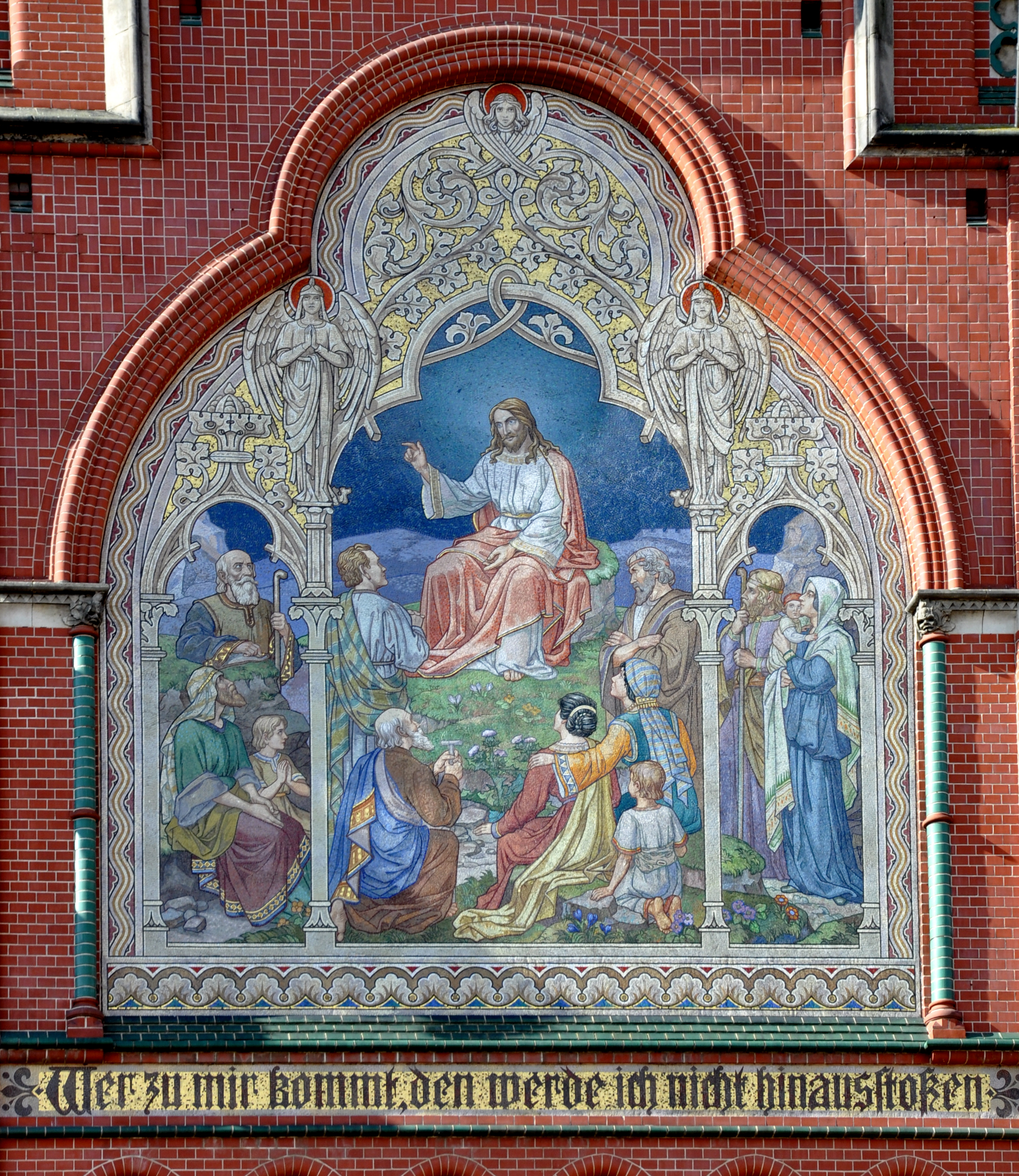 Altenburg, ev. Brüderkirche, Fassade, Mosaik von Otto Berg: „Bergpredigt“; Ausführung: Fa. Puhl & Wagner, Rixdorf